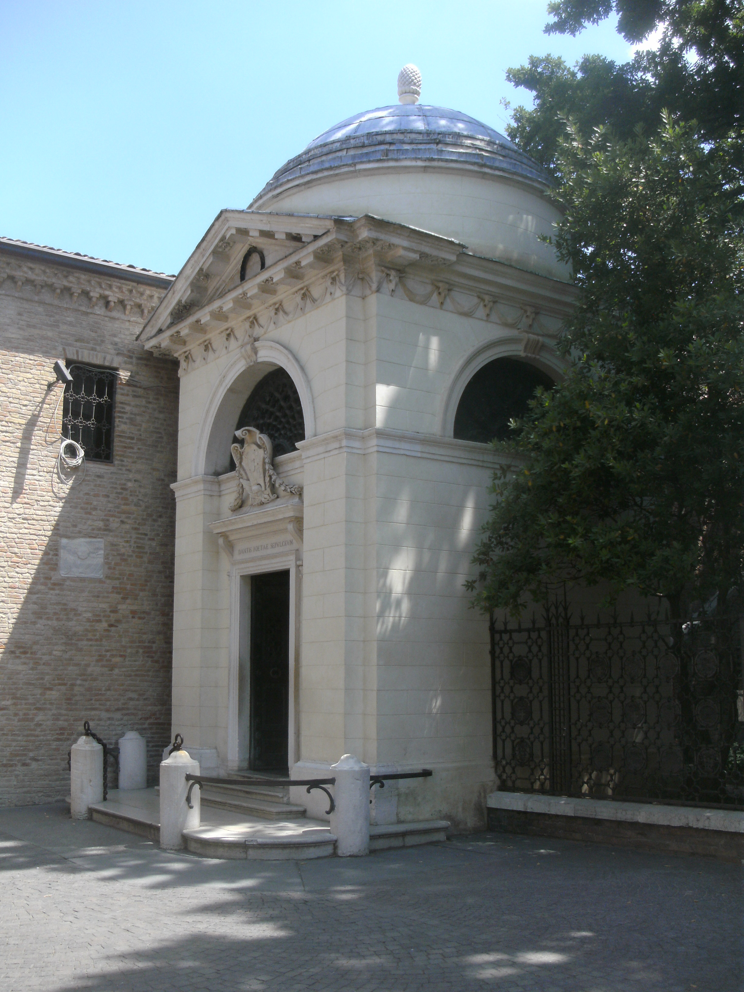 Ravenna, Dante-Erinnerungstempelchen an der Außenmauer des Kreuzgangs der Klosterkirche San Francesco